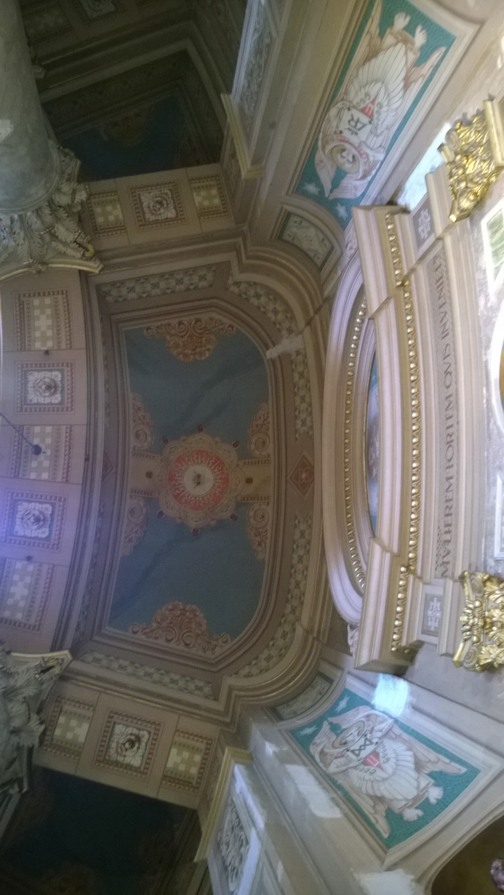 Detalle